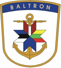 BALTRON insignia